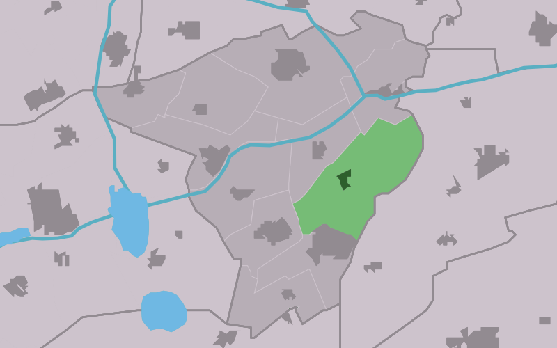 Kaartsje fan himrik fan Surhuzum